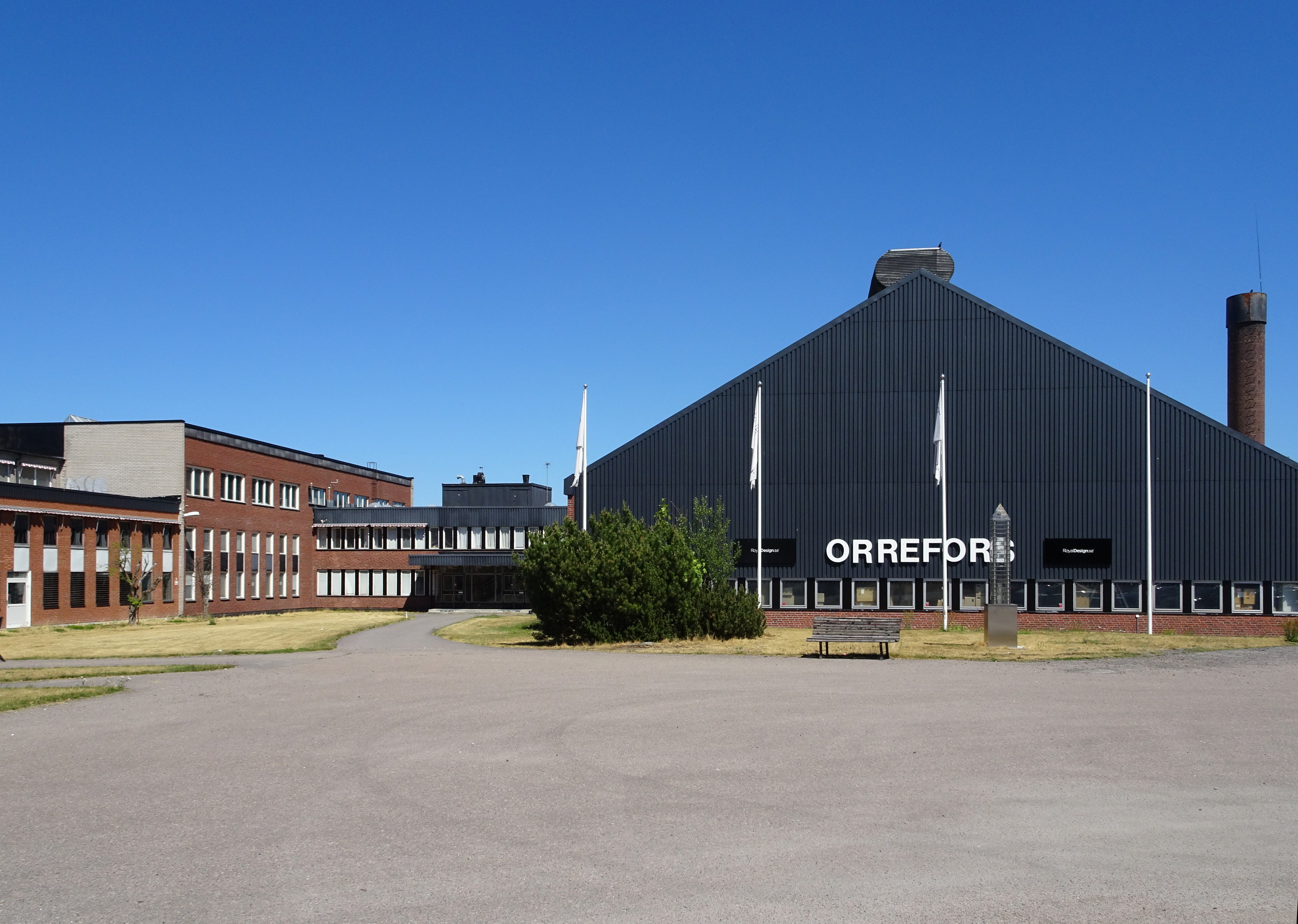 Orrefors glasbruks gamla byggnader